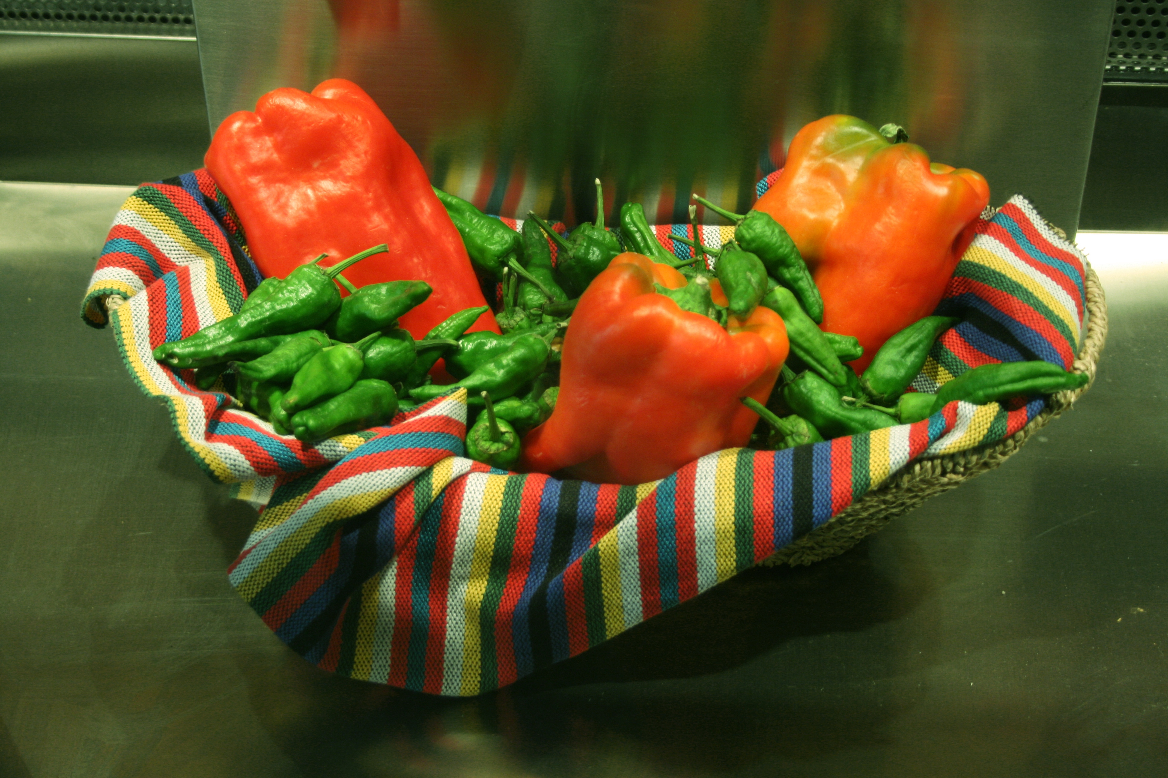 Pimientos